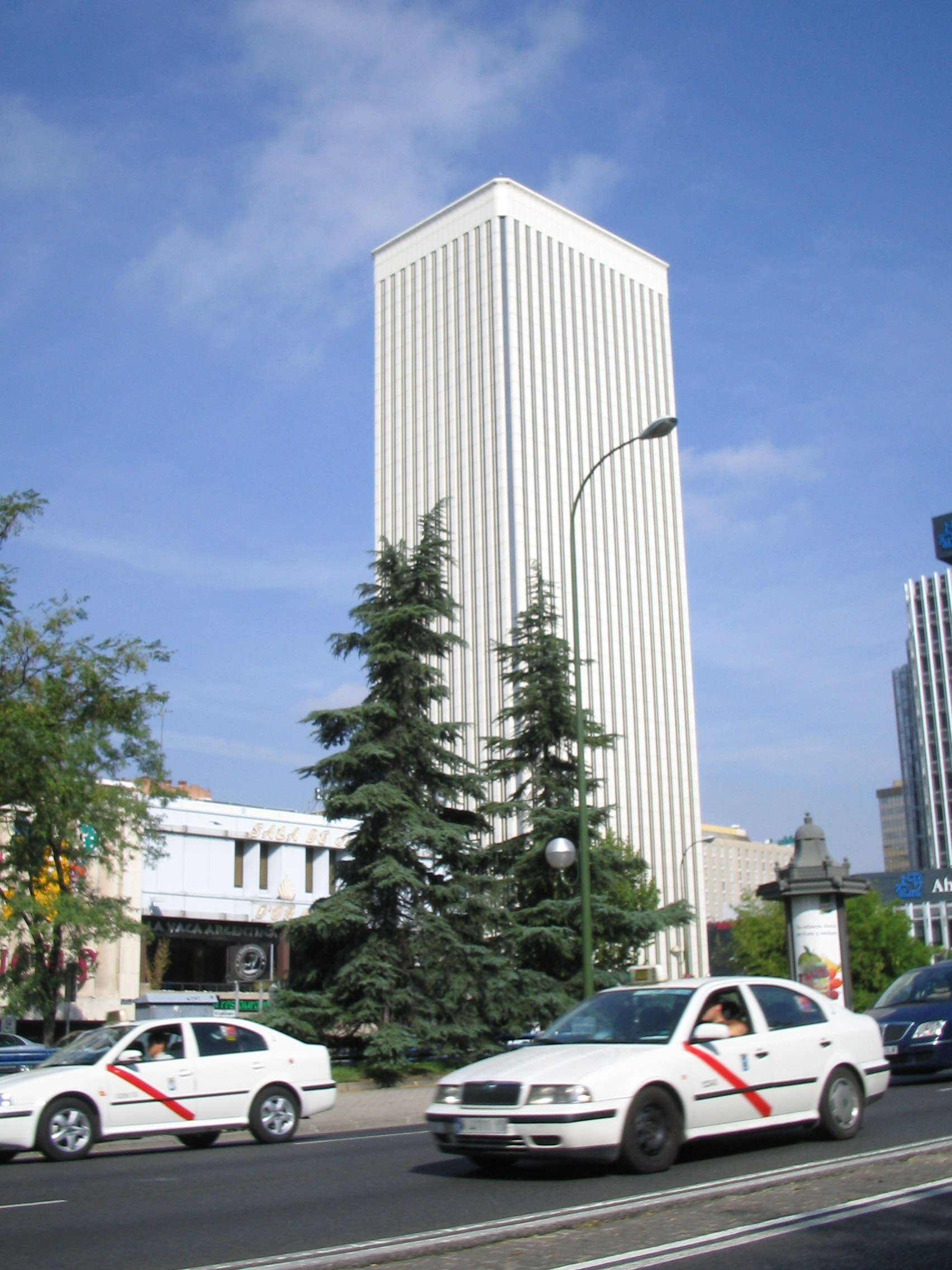 Torre Picasso vista desde el Paseo de la Castellana.